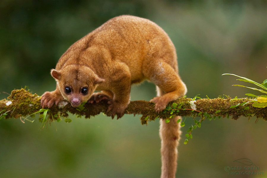 Кинкажу (Potos flavus)